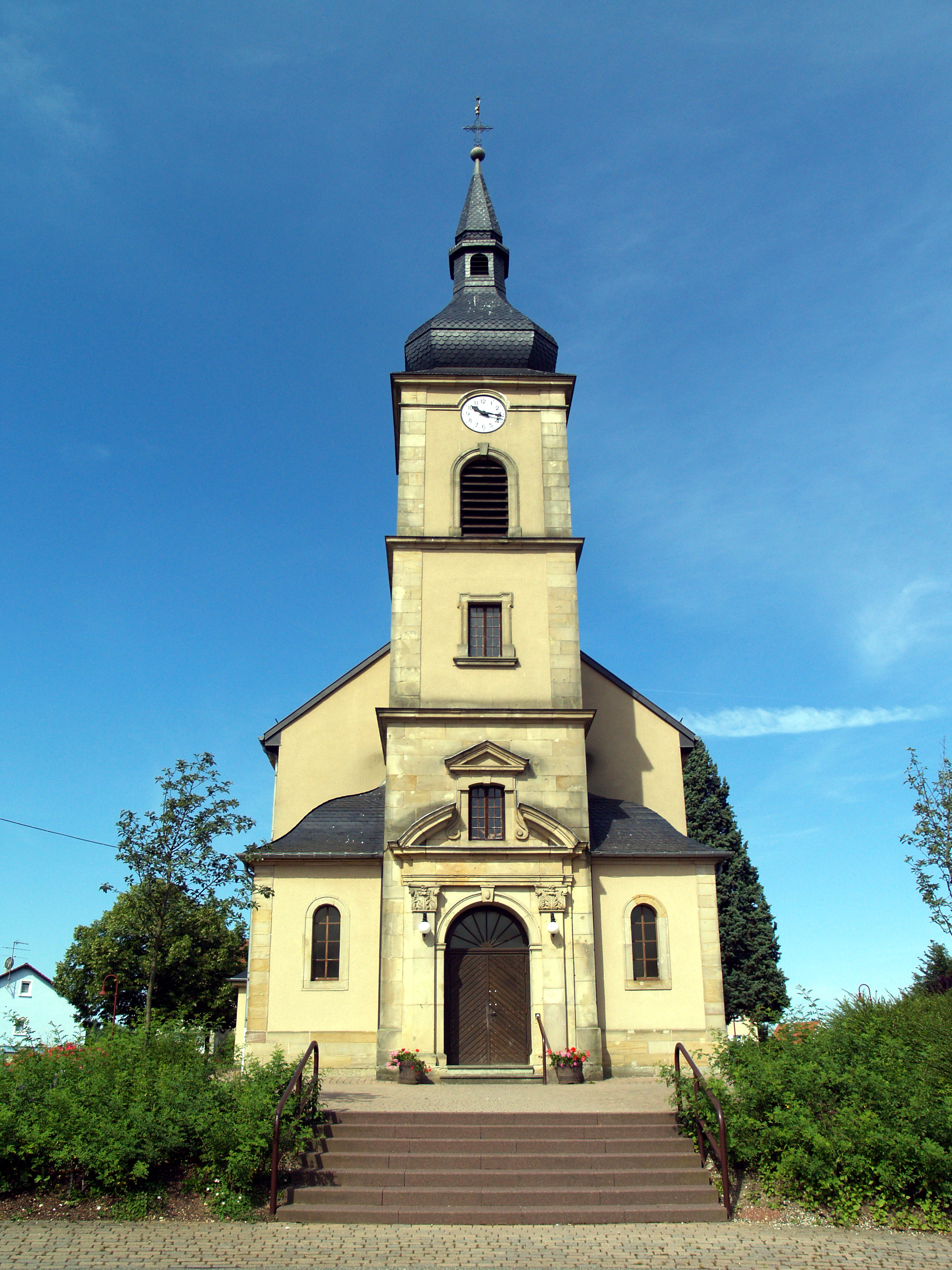 L'église reconstruite après la seconde guerre mondiale